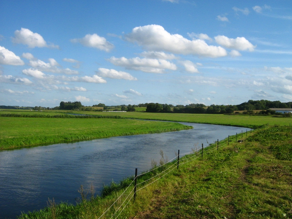 die Tollense bei Brook